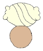 Glifo Náhuatl del municipio de Tecozautla, Hidalgo